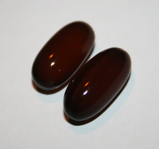 Myke omega-3-kapsler